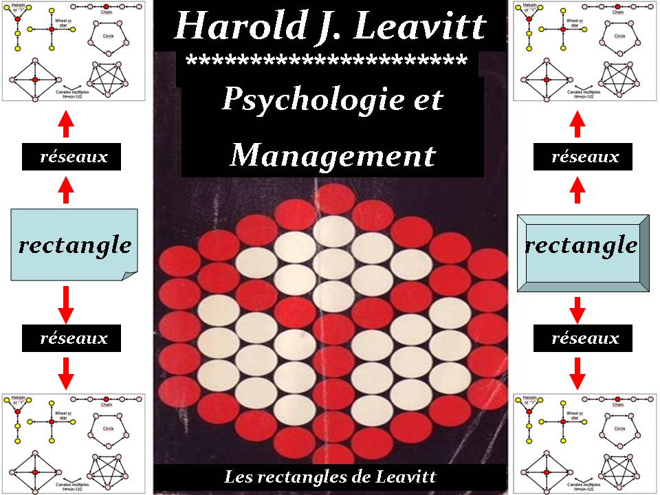 Illustration des théories de Leavitt